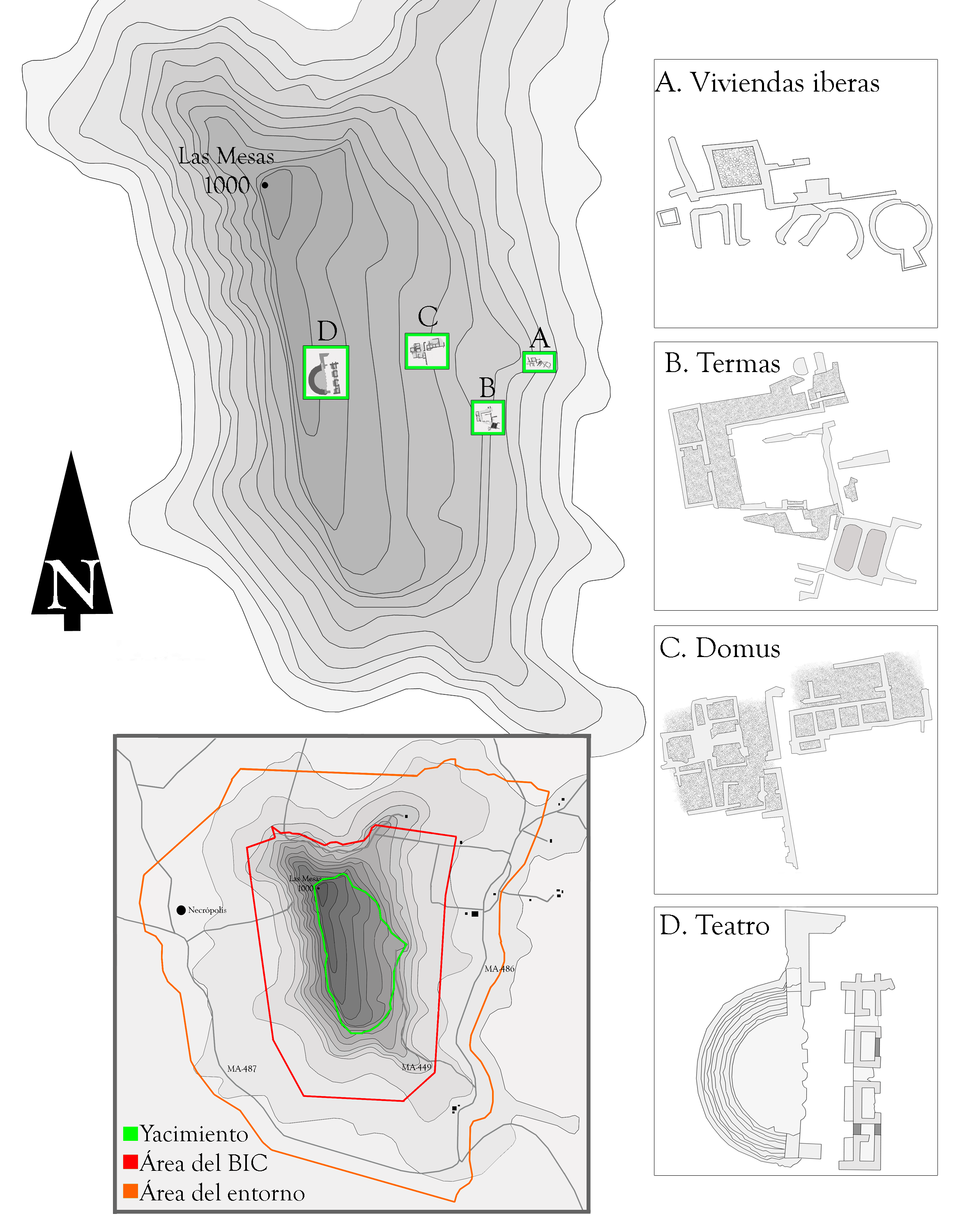 Plano del yacimiento de la ciudad romana de Acinipo (Ronda la Vieja). Se indica su situación general y límites protegidos así como la planta de las principales estructuras excavadas. Ronda, provincia de Málaga España.